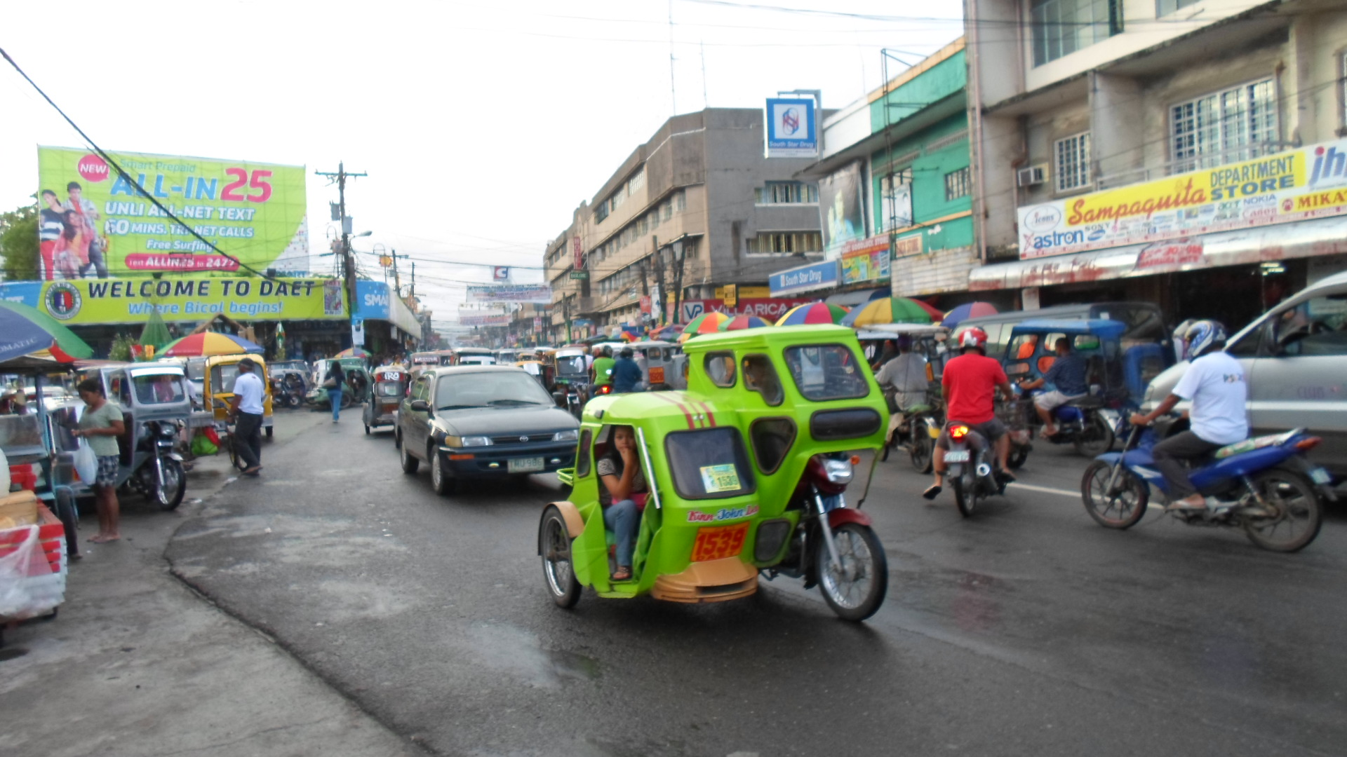 STREET IN DAET DEZEMBER 2012